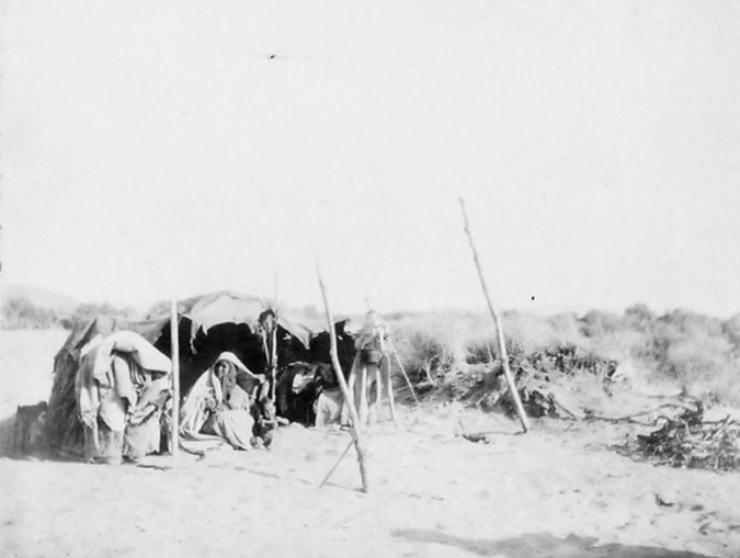 Mission Méry 1893 - Tente et Touareg